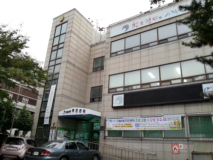 구월4동 주민센터